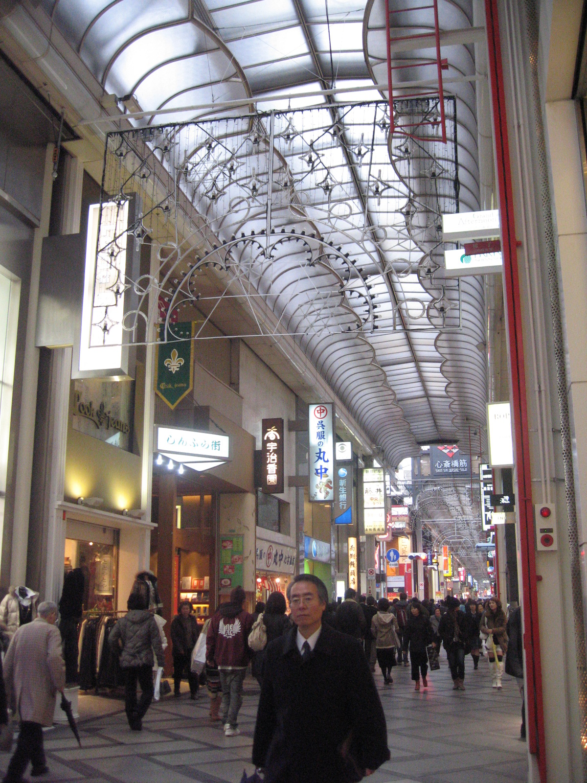 Shinsaibashi, Osaka, Kansai Region.